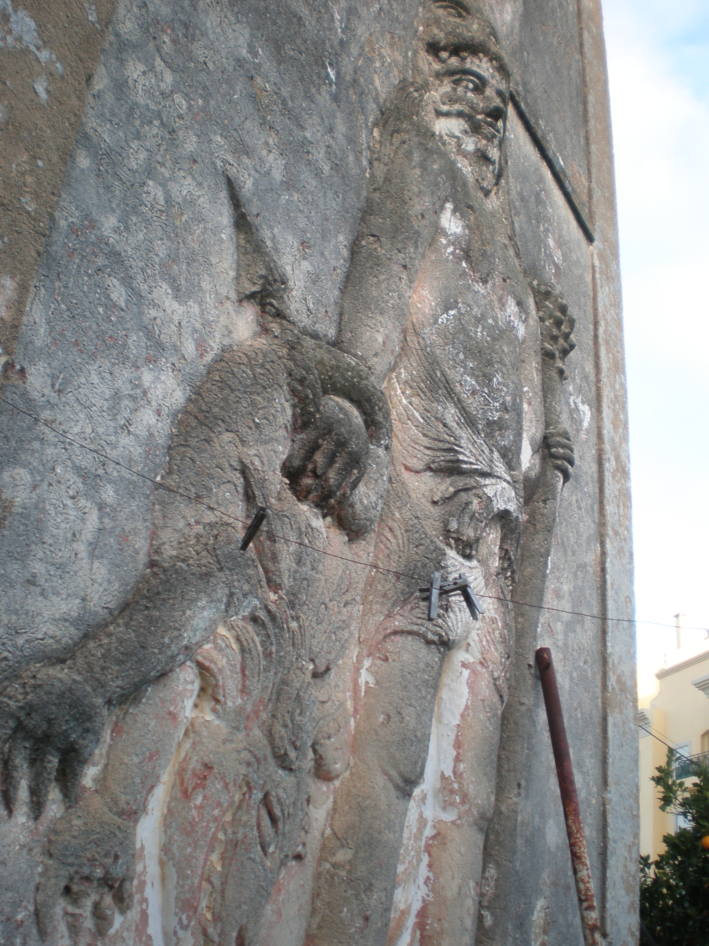 Figura em relevo na parede do Celeiro de São Francisco ou Torre da Horta dos Cães, Faro, Portugal